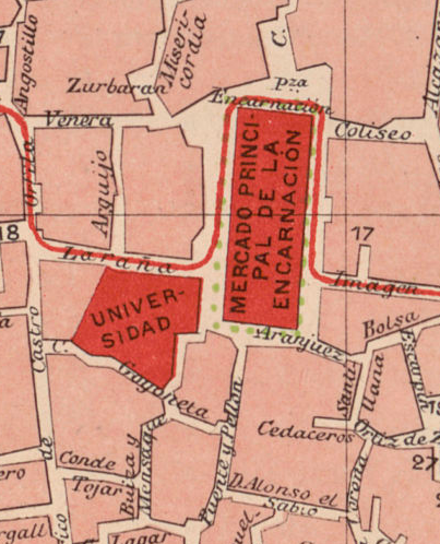 Fragmento de mapa de Sevilla de 1910 que muestra la Universidad en la plaza de la Encarnación.